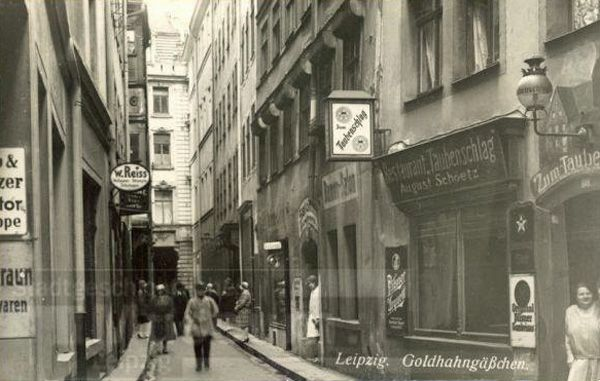 Das Goldhahngäßchen in Leipzig um 1930 mit Blick zur Nikolaistraße